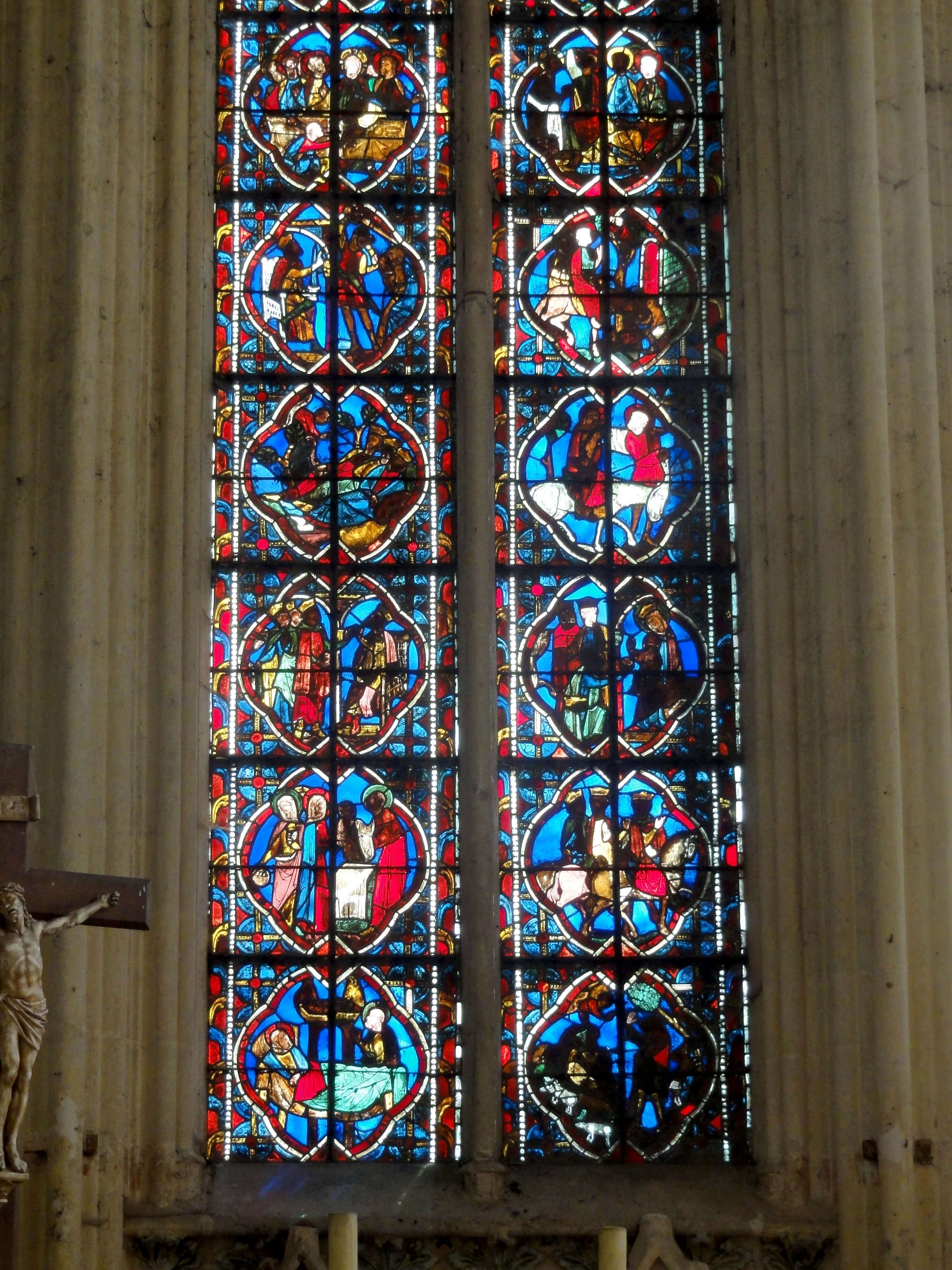 Vitraux classés de l'abside de la chapelle de la Vierge (Sainte-chapelle) du XIIe, XIIIe et XVIe siècle - voir le titre du fichier.